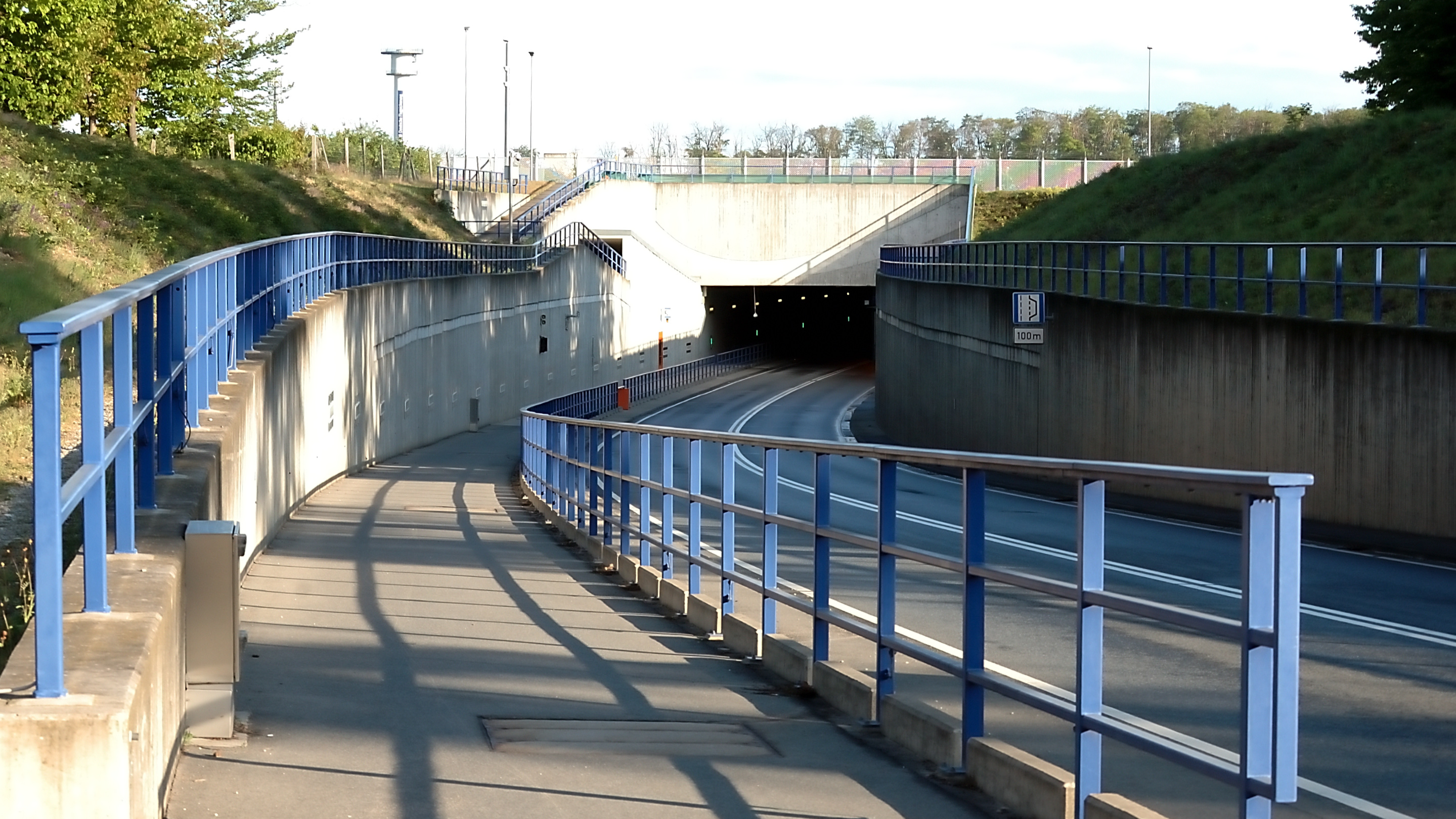 Nordportal des Mönchwaldtunnels